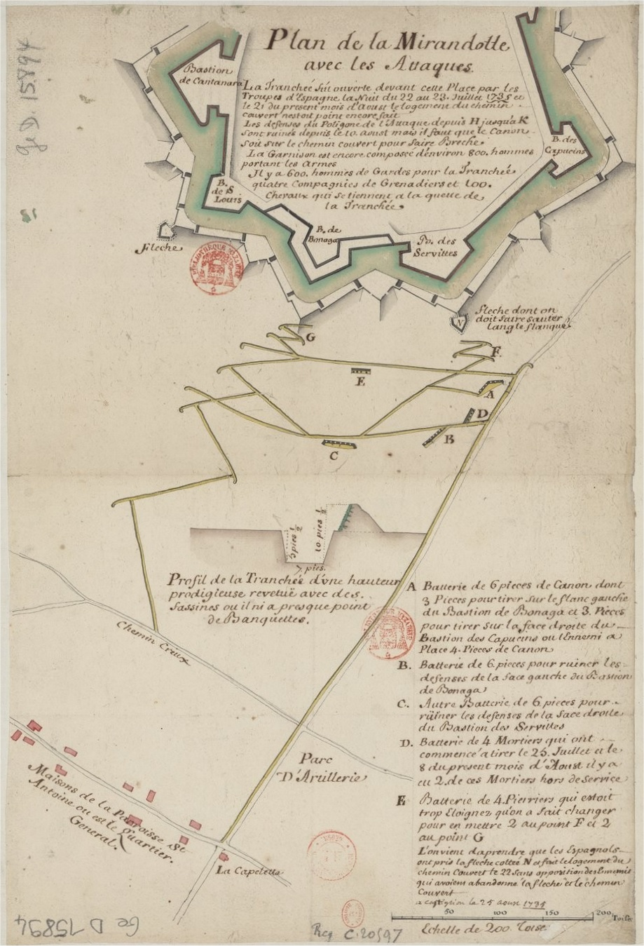 Piano di attacco dell'assedio di Mirandola del 25 agosto 1735 Plan de la Mirandolle avec les Attaques La Tranchée fiù ouverte devant cette Place pae les Troupes d’Espagne la Nuit du 22 au 23 Juillet 1735 et le 21 du present mois d’Aoust le logement tu chemin couvert nestant point encore fait. Les defenses du Poligone de l’Attaque depuis H jusqu'à K sont ruinés depuis le 10 Aoust mais il faut que le canon soit sur le chimin couvert pour faire breche. La Garnison est encore composée d’environ 800 hommes portant les armes. Il y a 600 hommes de Gardes pour la Tranchée Quatre Compagnies de Grenadiers et 100 chevaux qui se tiennent a la queue de la tranchée.